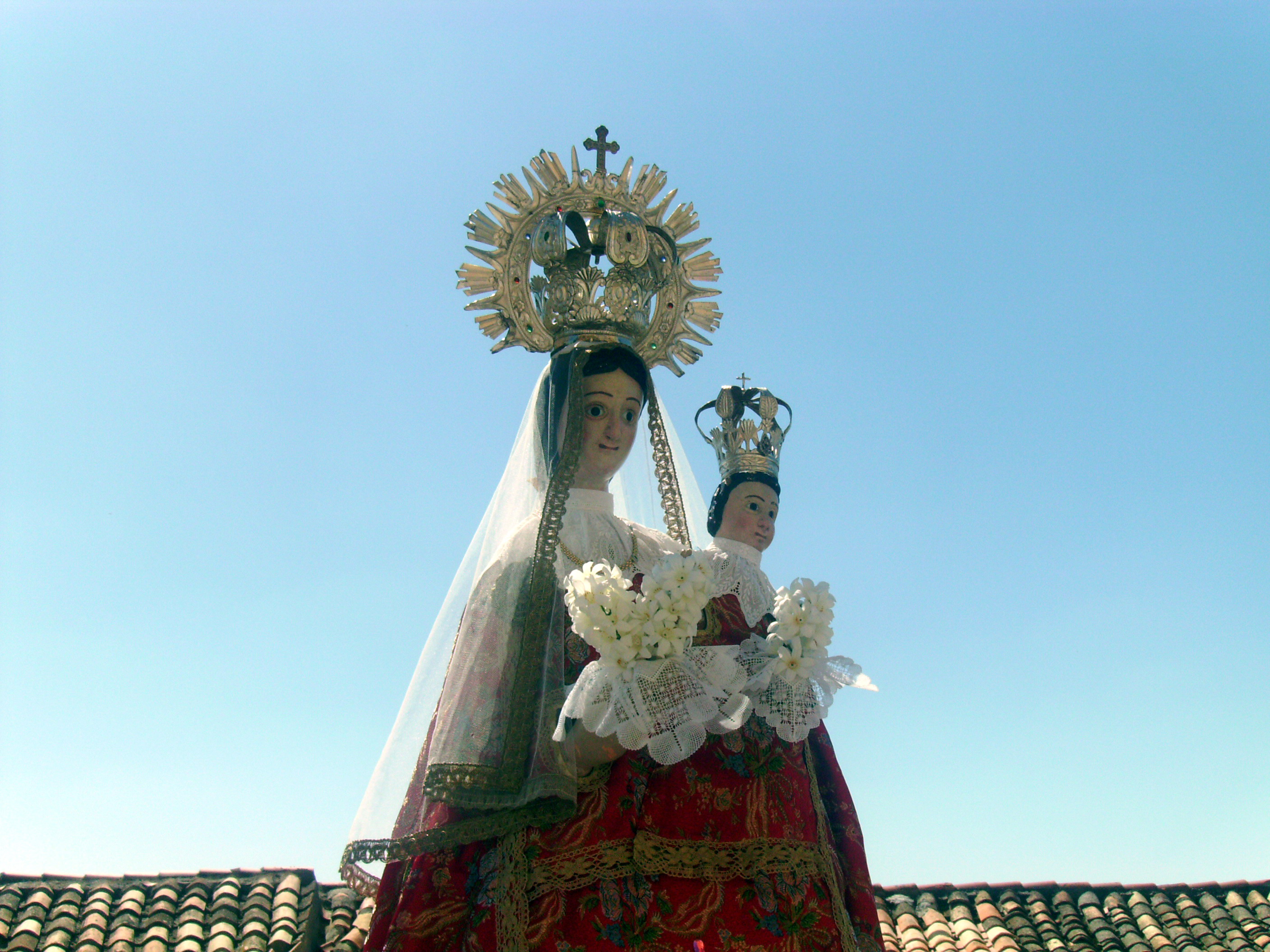 Representación de la Virgen de Basardilla.